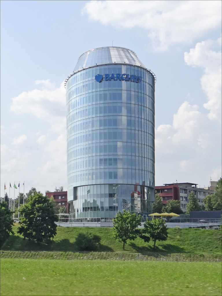 L'immeuble "vert" de bureaux de très haute qualité architecturale : Barclays Technology Centre Cet immeuble, livré en 2009, a été conçu par les agences d'architecture :Rambøll Danmark A/S et UAB Archprojektas Article sur le Green Hall dans MIMOA